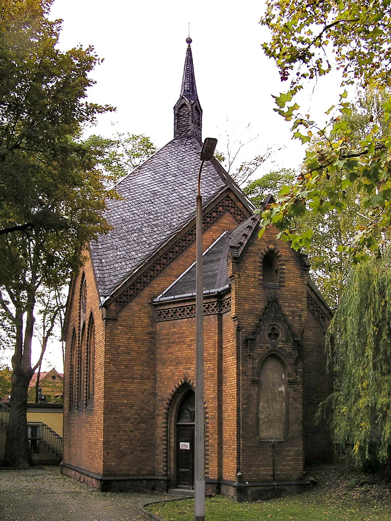 Kapelle im alten Universitätsklinikum